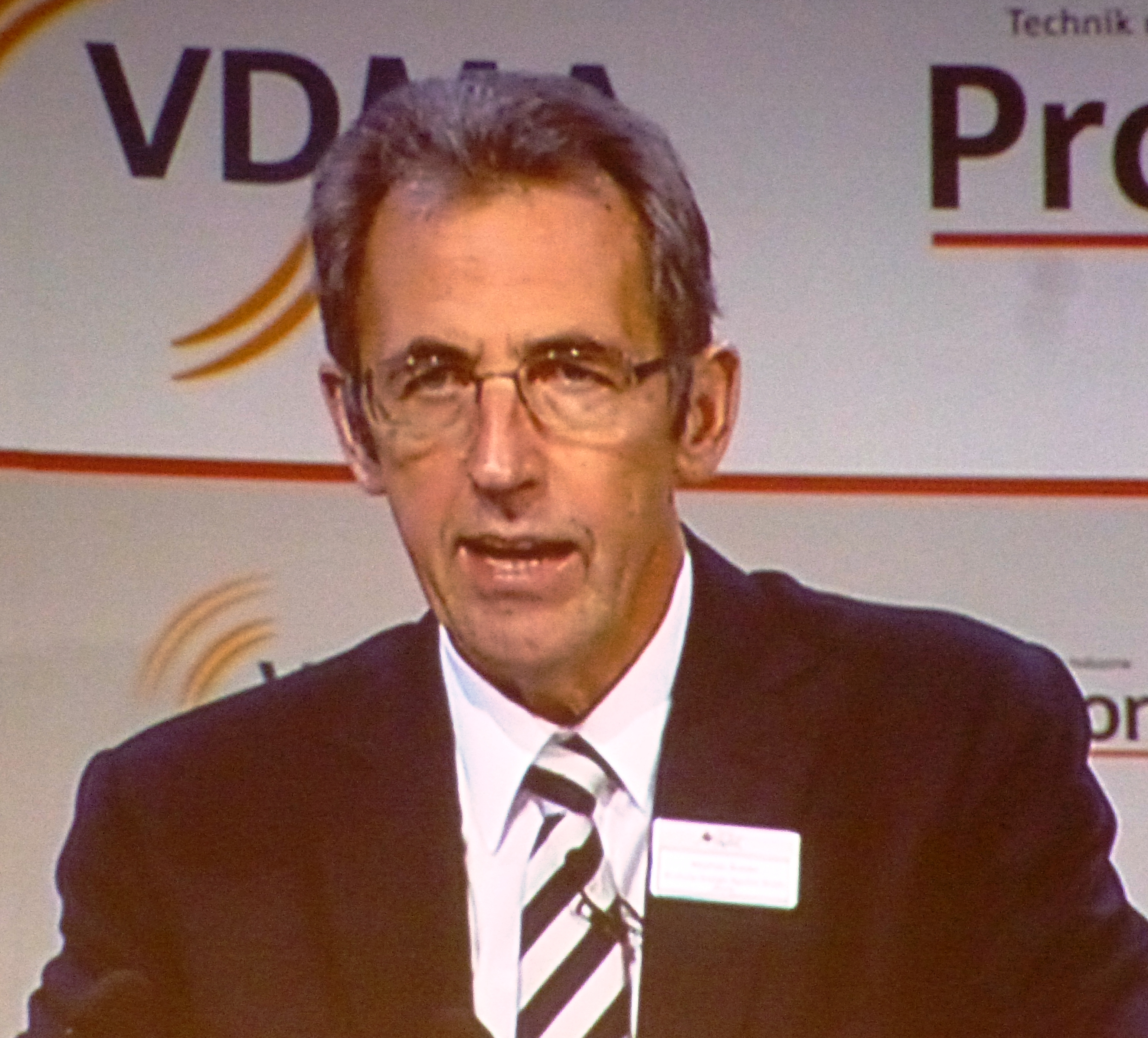 Head of dena (Deutsche Energieagentur = German Energy Agency) at the VDMA Conference in Berlin 2012